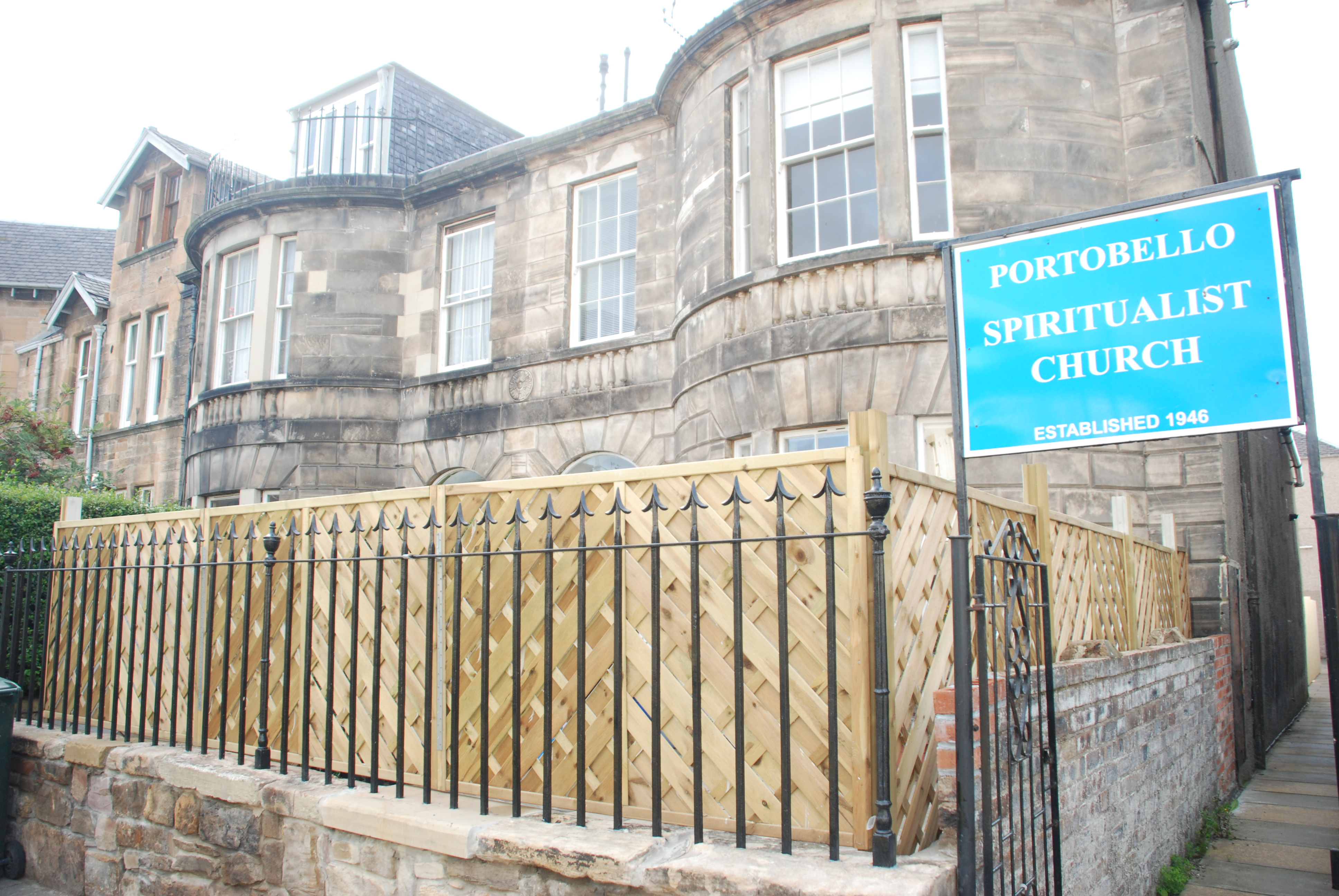 Entrée de l'Eglise spiritualiste de Portobello, banlieu d'Edimbour, Ecosse